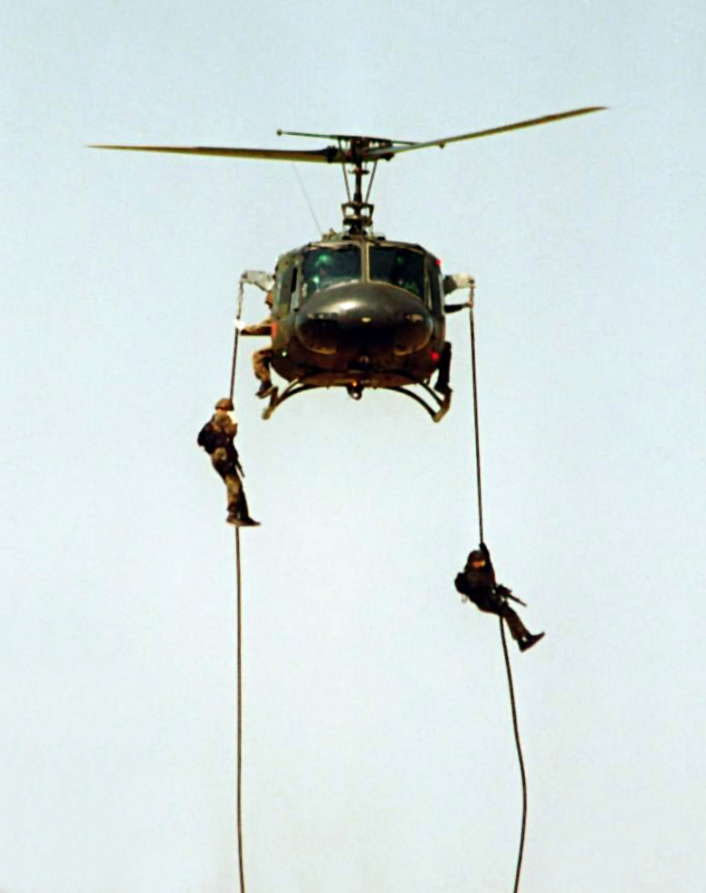 Bundeswehr-Vorführung auf der ILA 2000 in Berlin.